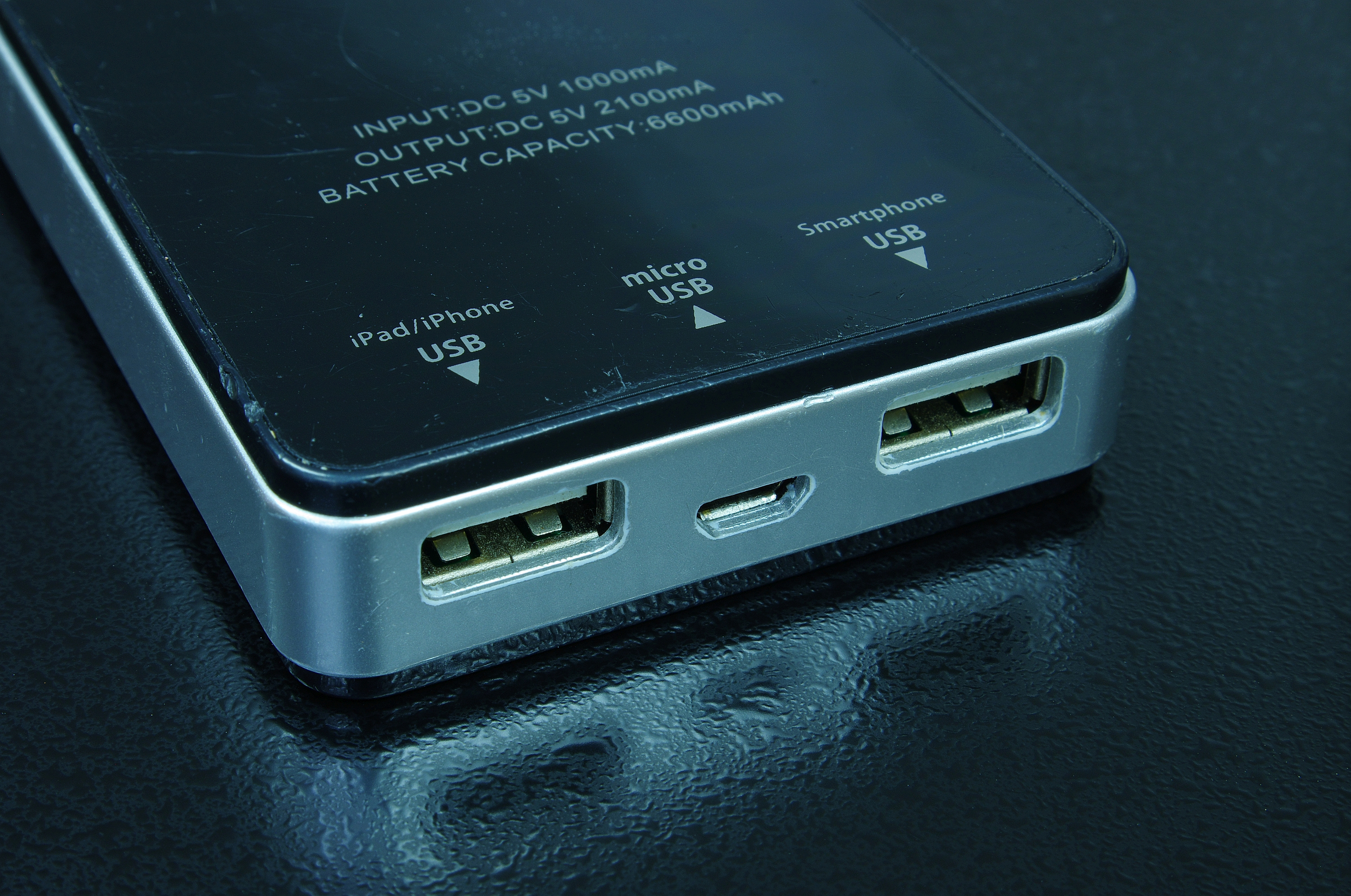 Powerbank mit zwei Ausgängen für iphone/iPad und andere Smartphones